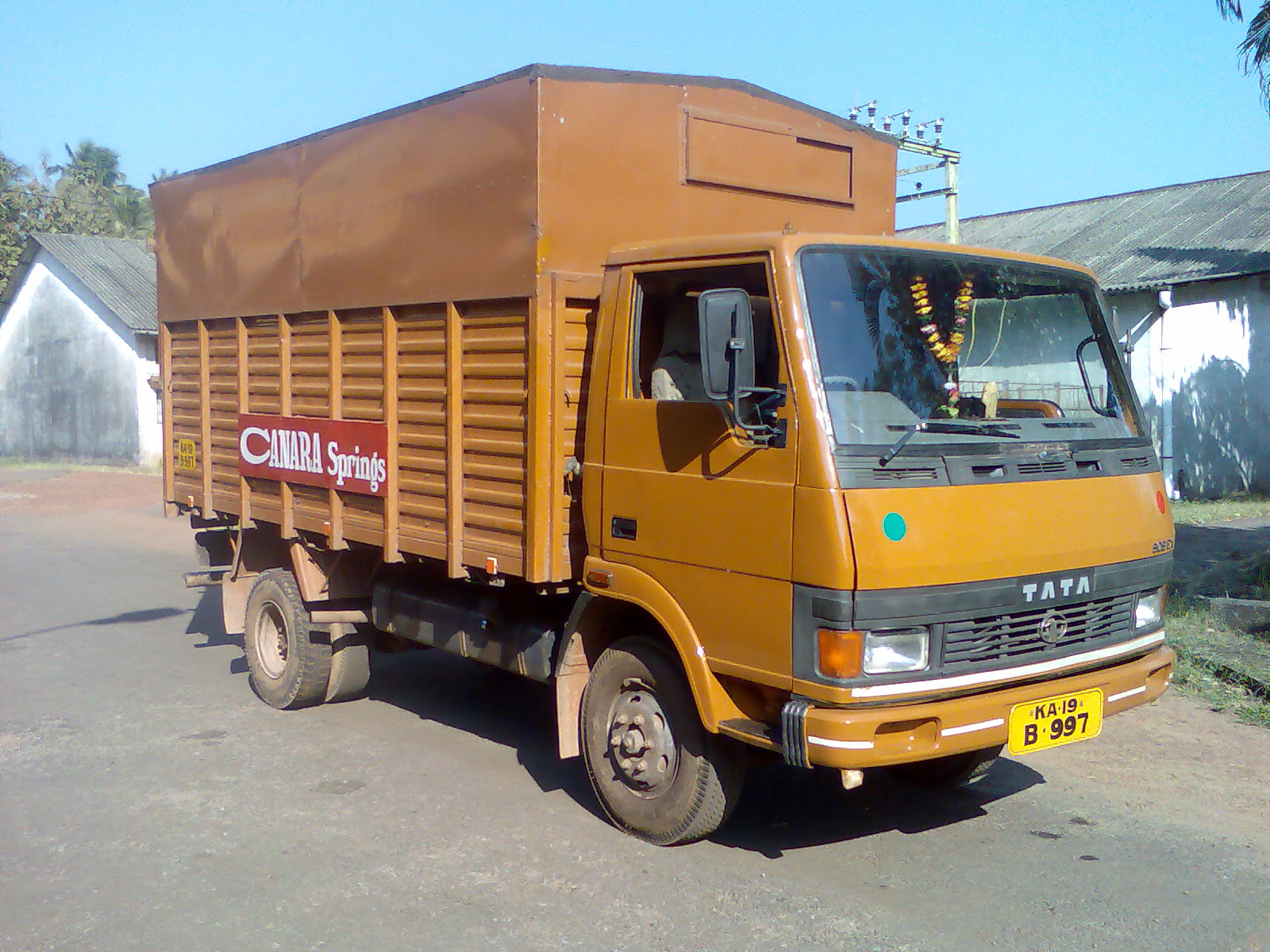 Tata 909 truck